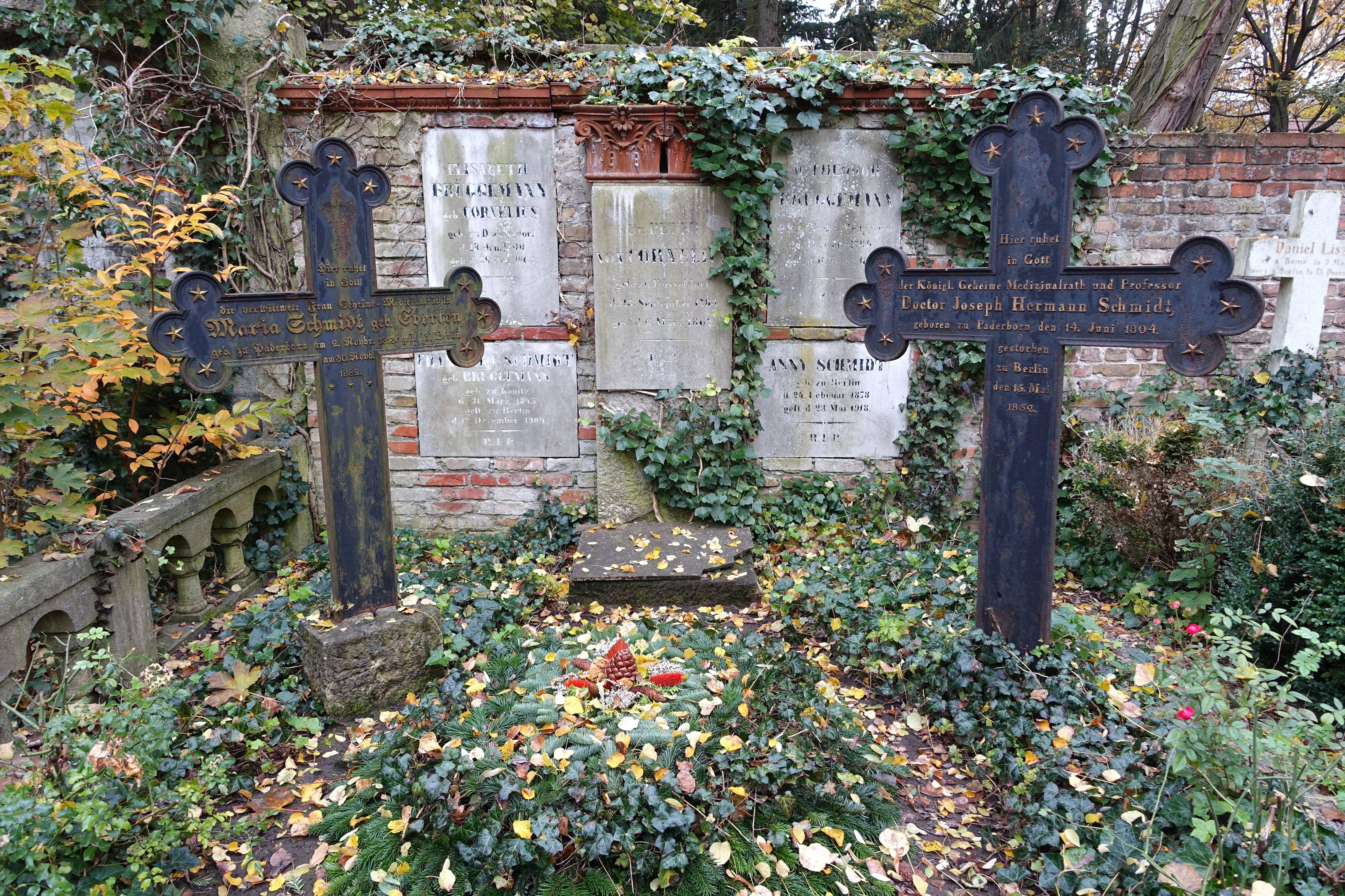 Alter Domfriedhof der St.-Hedwigsgemeinde, Berlin, Germany. Gusseiserne Grabkreuze nach einem Typenentwurf von Karl Friedrich Schinkel.